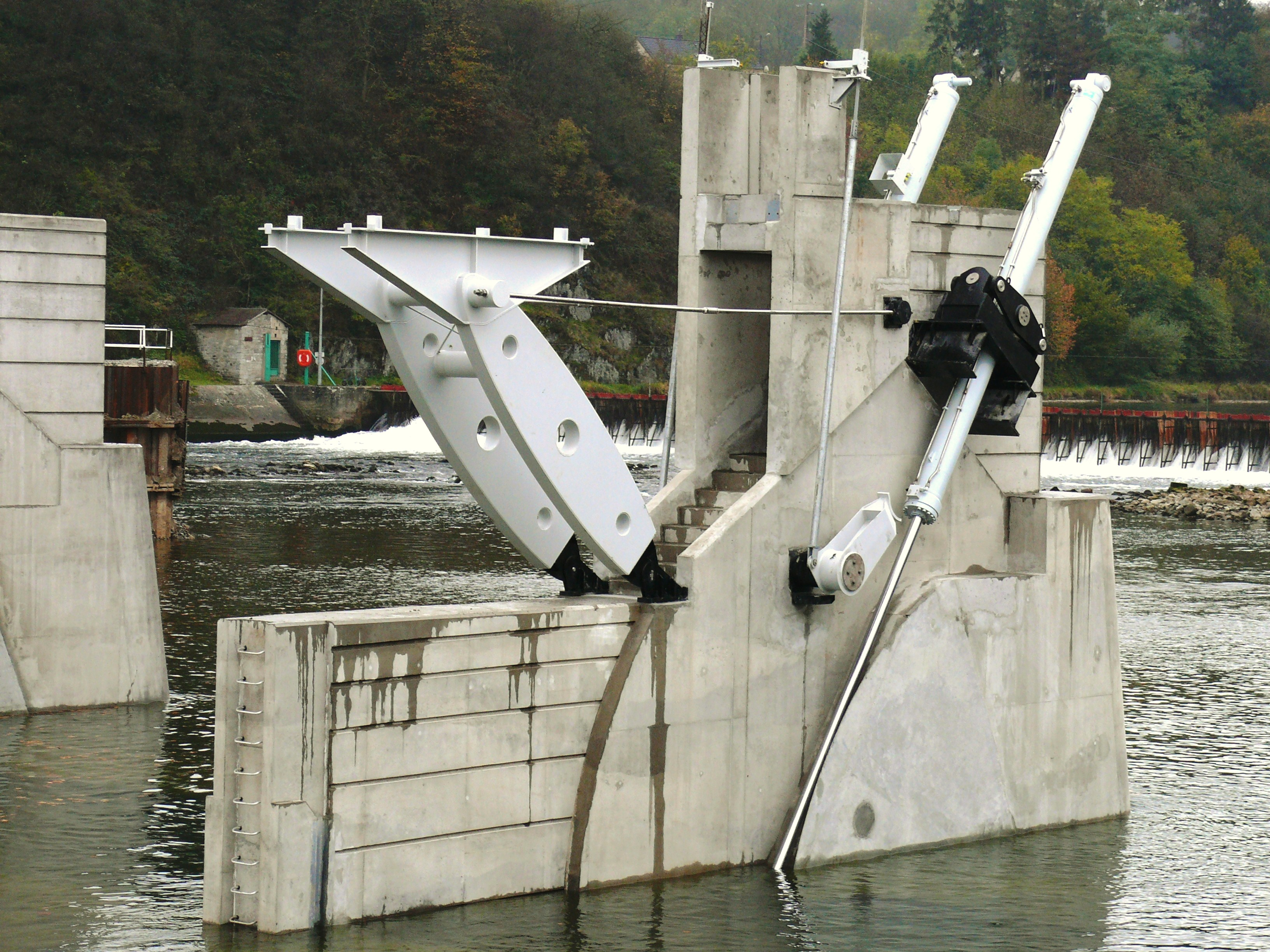 Givet - Nouveau barrage des quatre cheminées à vannes-clapets en construction (2007)